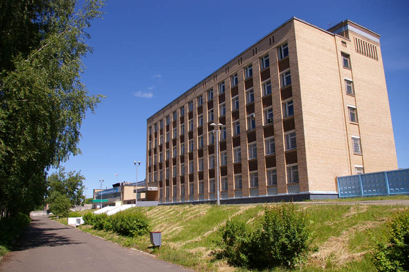 Проходная СМЗ в Савелово и Административный корпус